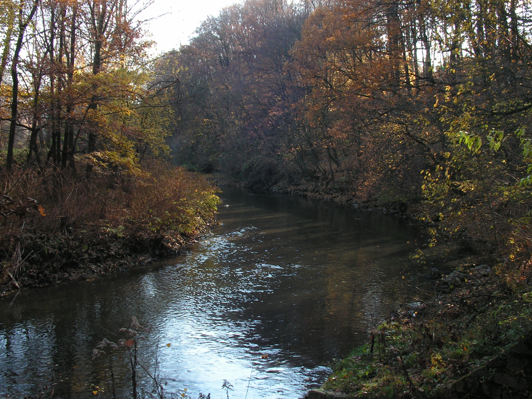 Fluss Chemnitz im Stadtteil Chemnitz-Altchemnitz